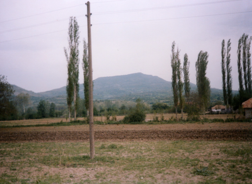 Dovezance, Macedonia